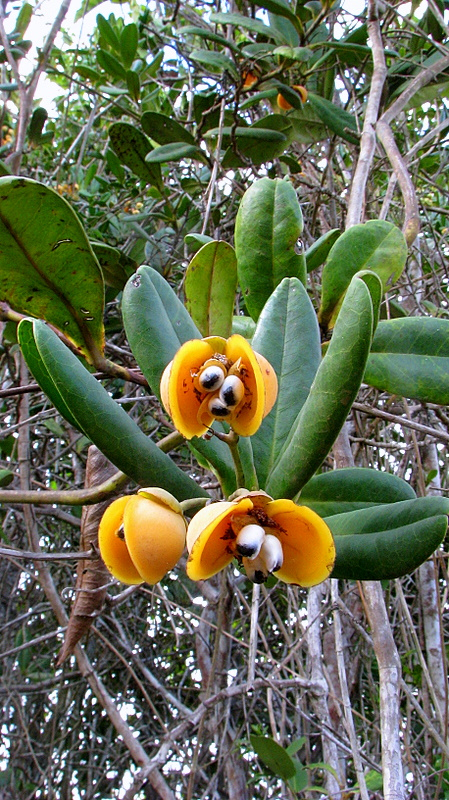 Davilla sessilifolia Fraga